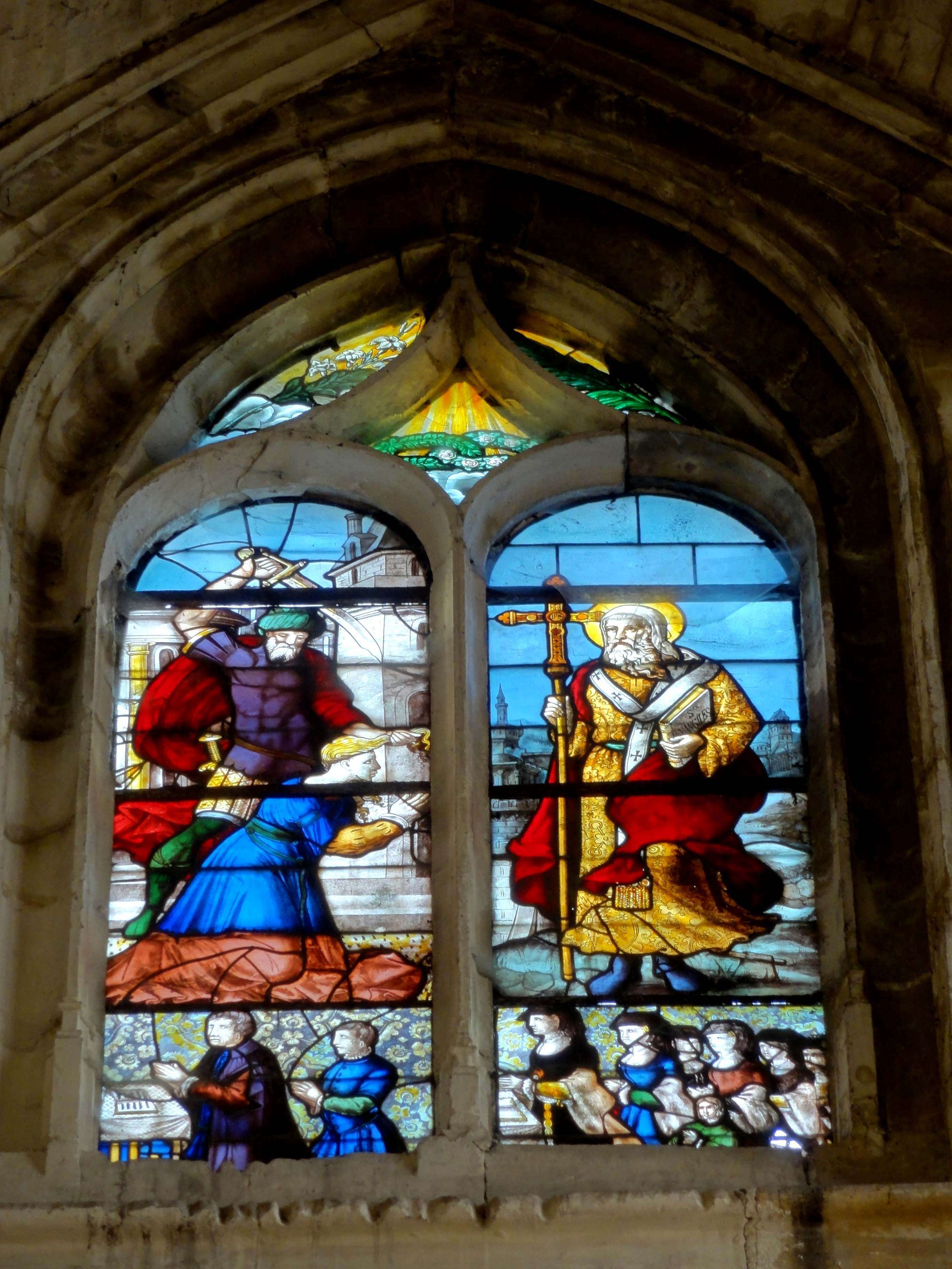 Croisillon sud, verrière du XVIe à l'est de la 1re travée, représentant le martyr d'une sainte ; cf. Louis Régnier, p. 86.